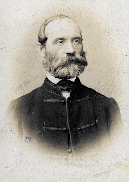 Hunfalvy Pál (született Paul Hunsdorfer) (Nagyszalók, 1810. március 12. – Budapest, 1891. november 30.) cipszer származású kisnemes, magyar jogász, etnológus, nyelvész, az 1848-1849-es forradalom idején parlamenti képviselő, az MTA tagja.